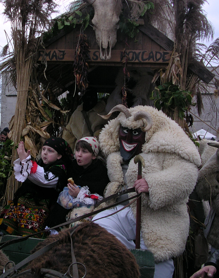 A mohácsi busók diszes kocsija